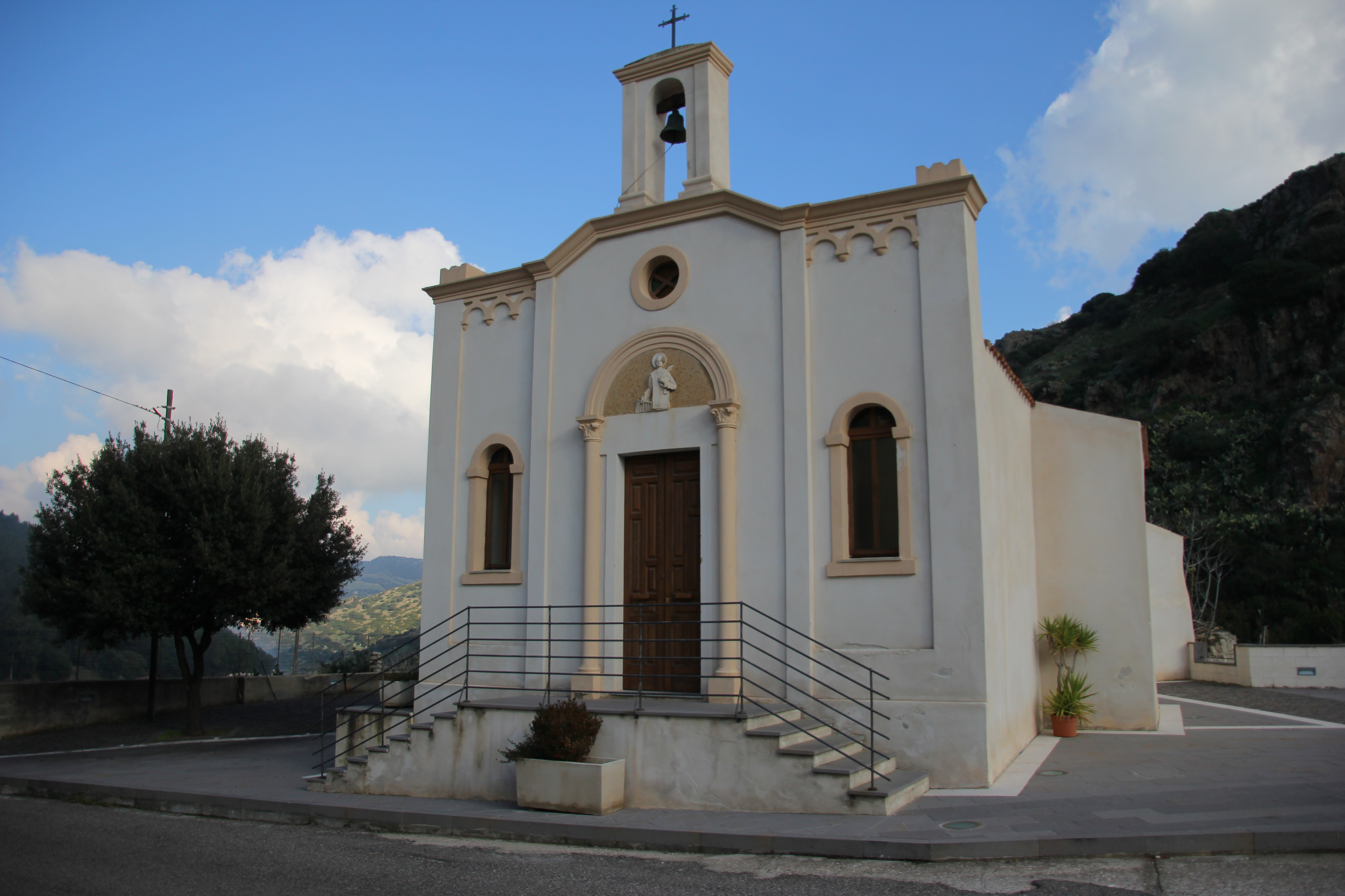 Osilo-San Lorenzo - Chiesa di San Lorenzo